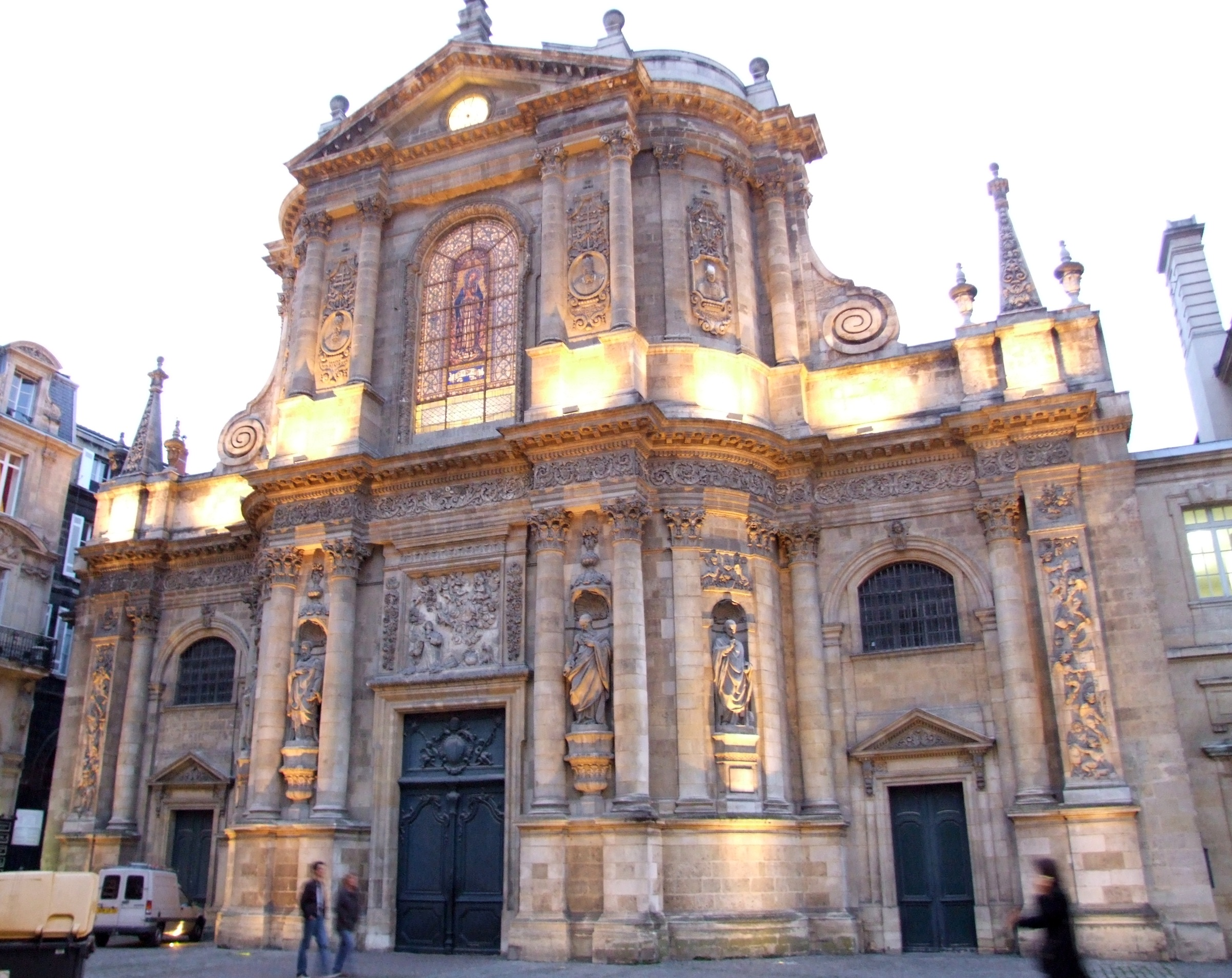 Église Notre-Dame, Bordeaux, Gironde, FRANCE